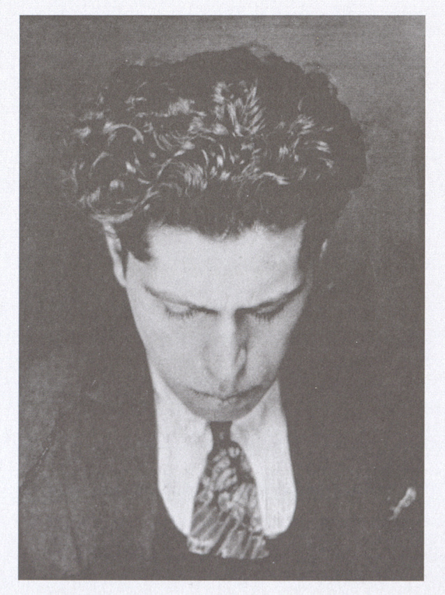 Fotografía del poeta Germán List Arzubide